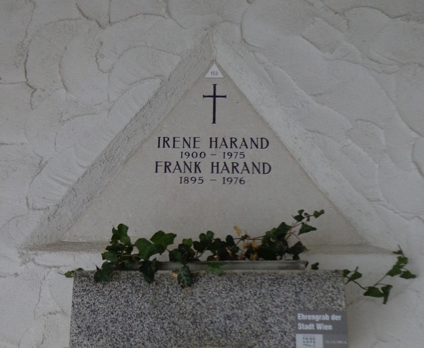 Feuerhalle Simmering - Arkadenhof (Abteilung ARI)